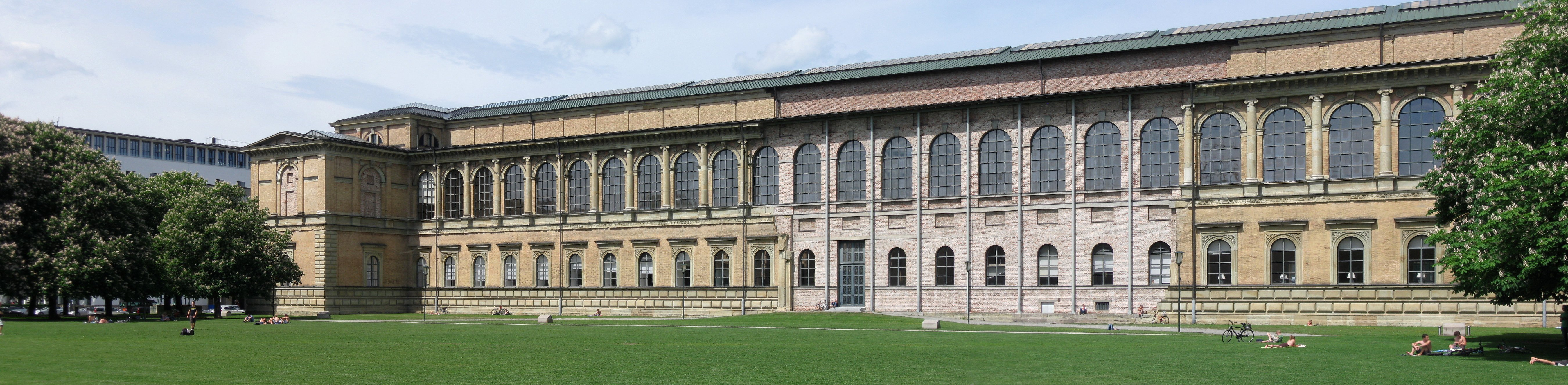 Barer Straße 27; Nähe Arcisstraße. Alte Pinakothek, repräsentativer Galeriebau mit Eckrisaliten in Formen der italienischen Hochrenaissance, von Leo von Klenze, 1826-36, nach Kriegsschäden von Hans Döllgast 1952-57 wiederhergestellt bzw. in schlichter Form ergänzt; mit Ausstattung; ringsum (erneuerte) Gartenanlage.